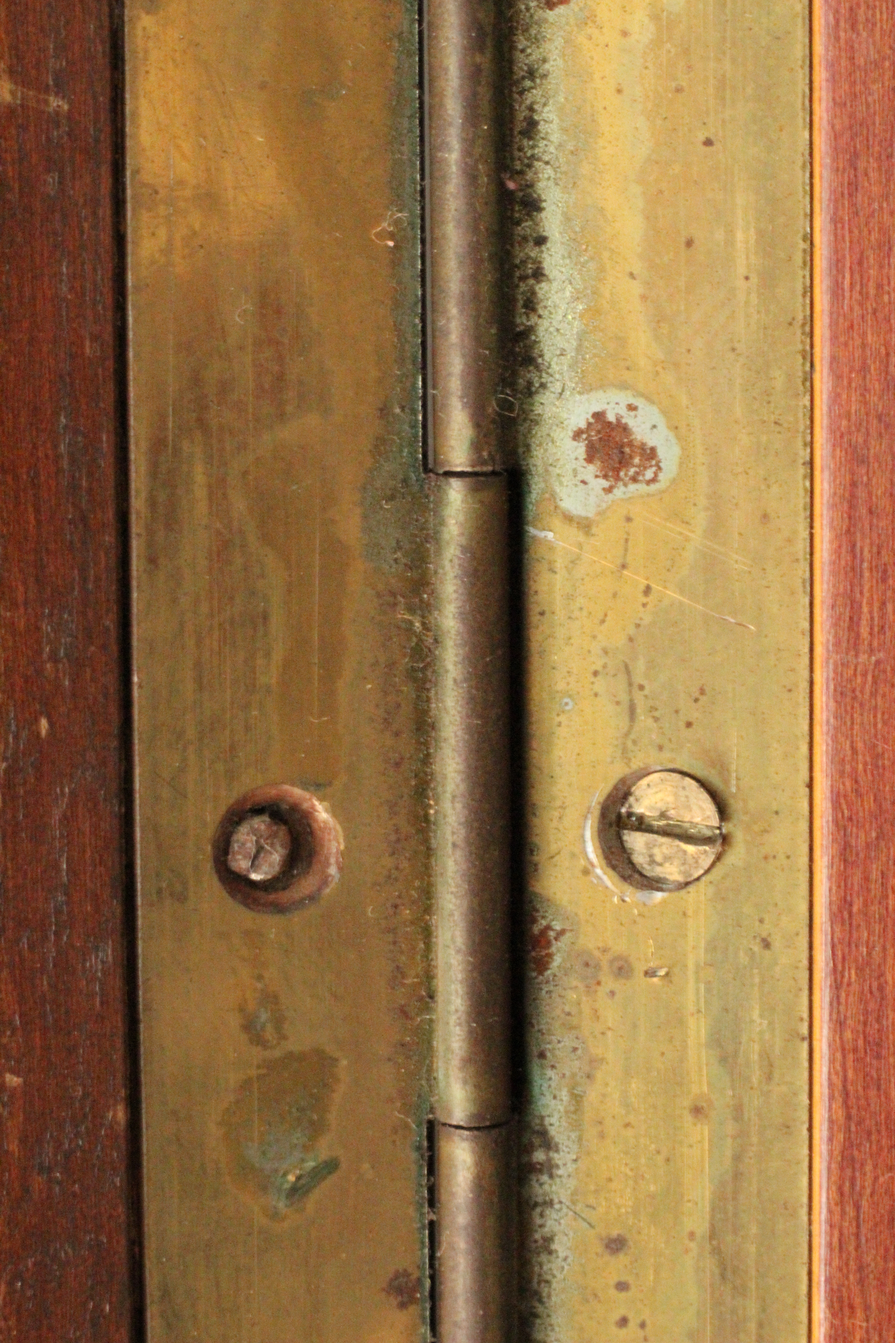 Bildinhalt: Klavierband, Detail Aufnahmeort: Baden-Baden, Deutschland